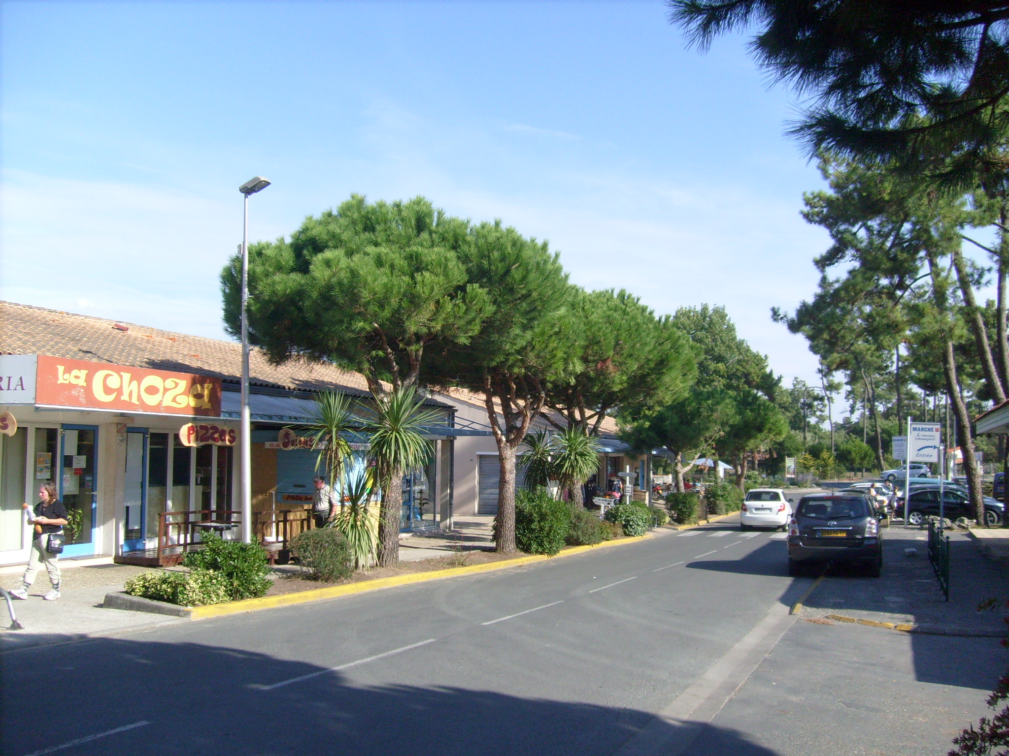 Centre commercial de Grand-Village-Plage